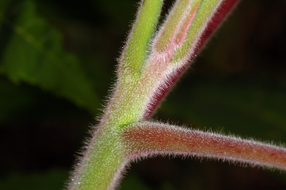 Rhus typhina, Idstein, Hessen, Deutschland